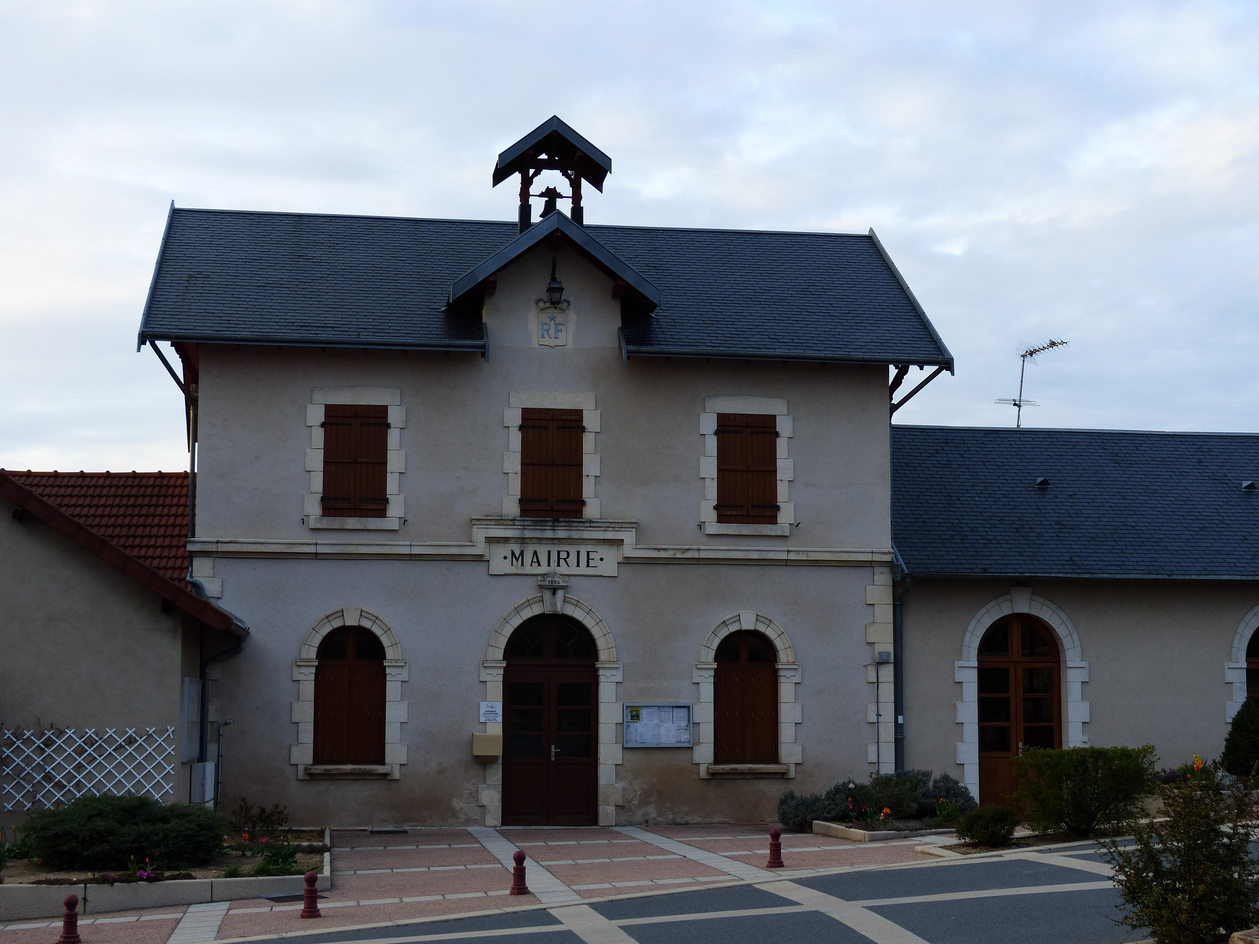 Mairie d'Estivareilles (Allier).